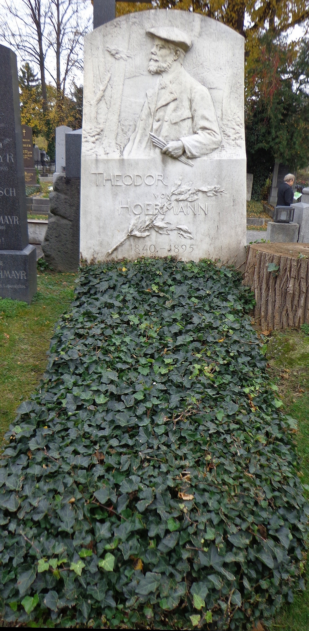 Wiener Zentralfriedhof - Gruppe 31A: Ehrengrab des Malers Theodor von Hörmann